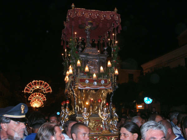 Urna del santo contenente le sue relique, durante la processione del 5 maggio a Licata